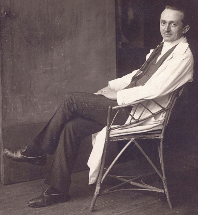 Alois Boháč (1885-1945)